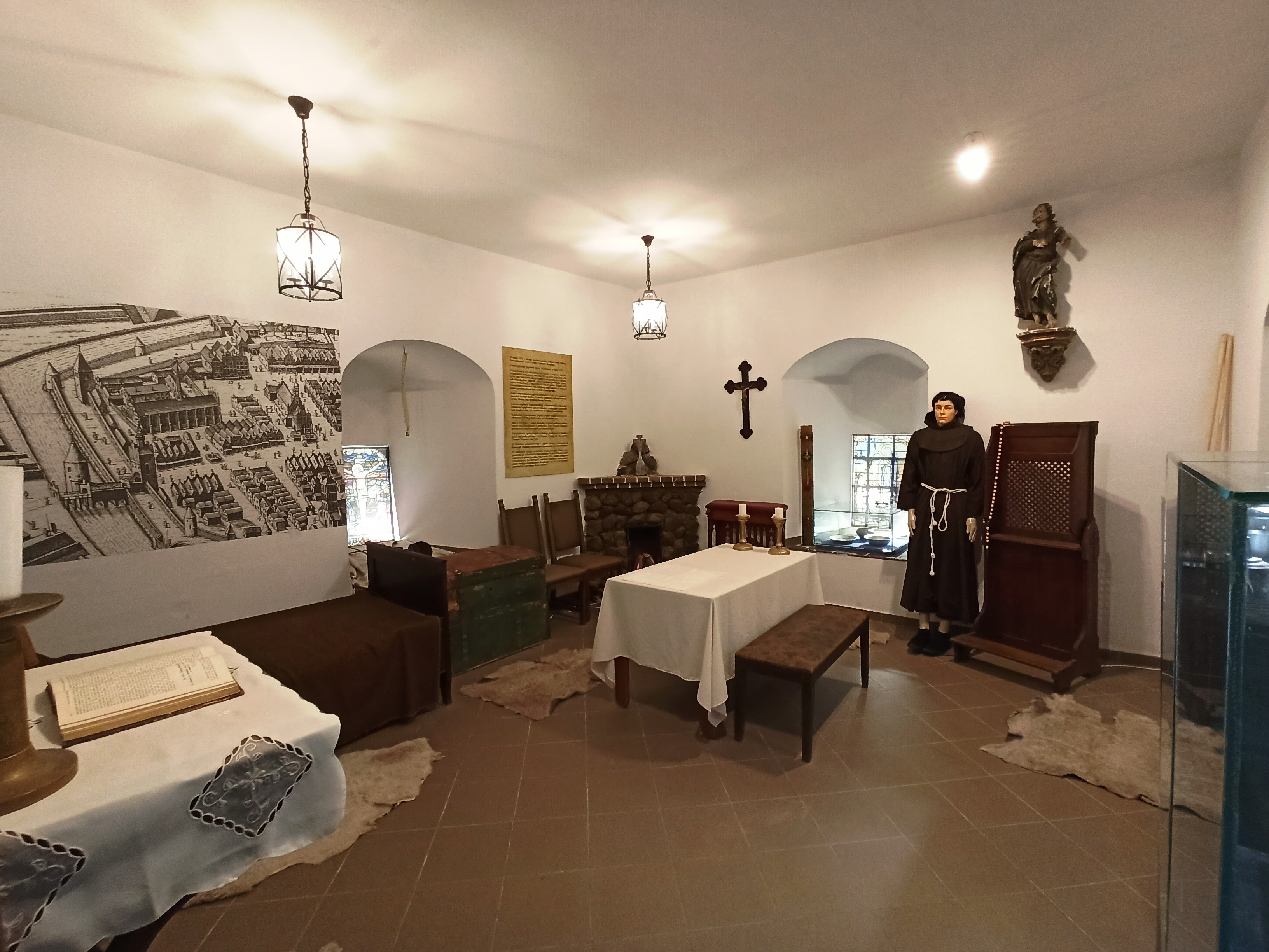 Braniewo Muzeum Ziemi Braniewskiej Wieża klesza cela franciszkańska